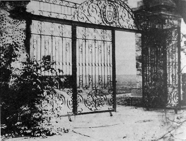 Беларуская (тарашкевіца): Сінча (Sinča), сядзіба Рарынскіх (Ratynski)